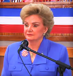 Política Salvadoreña Fundadora del Partido ARENA